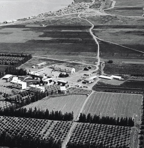 דגניה - מבט מלמעלה